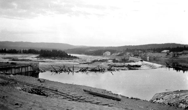 Skjefstadfoss fotografert nedover elva fra østbredden i 1910. Kraftverket som da nylig er bygget, ses i bakgrunnen på den andre siden av elva.